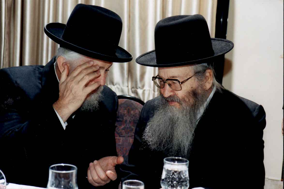 הרב הלל זקס עם הרב משה שמואל שפירא